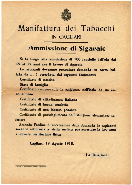 Bando di concorso per l'assunzione di 100 sigaraie. Lo stabilimento prese a funzionare con una strumentazione rudimentale, specializzandosi nella produzione di tabacchi da fiuto e trinciati per pipa. Nel 1868, tramite il sistema dell'appalto, la Manifattura viene data in gestione ad una società, denominata Regia, che introdusse la produzione di sigari cosiddetti toscani molto richiesti dal mercato, Cagliari 1918 (AS Cagliari, Fondo Manifattura Tabacchi)